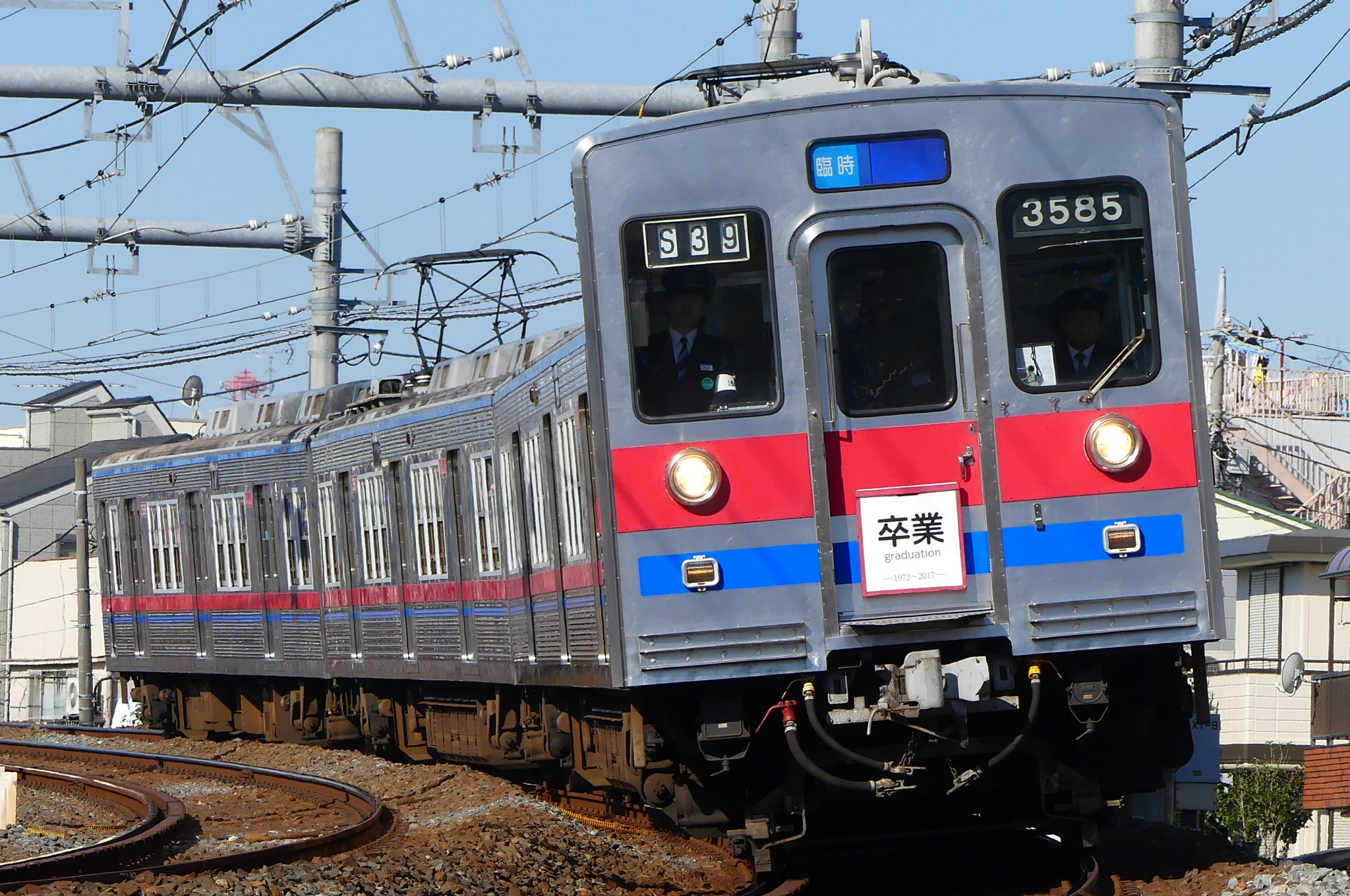 京成3500形未更新車による最終運行